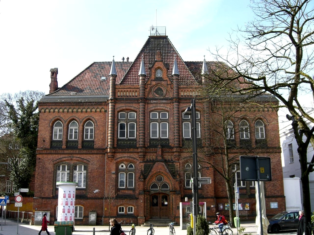 Hauptturnhalle Lübeck (selbst aufgenommen)